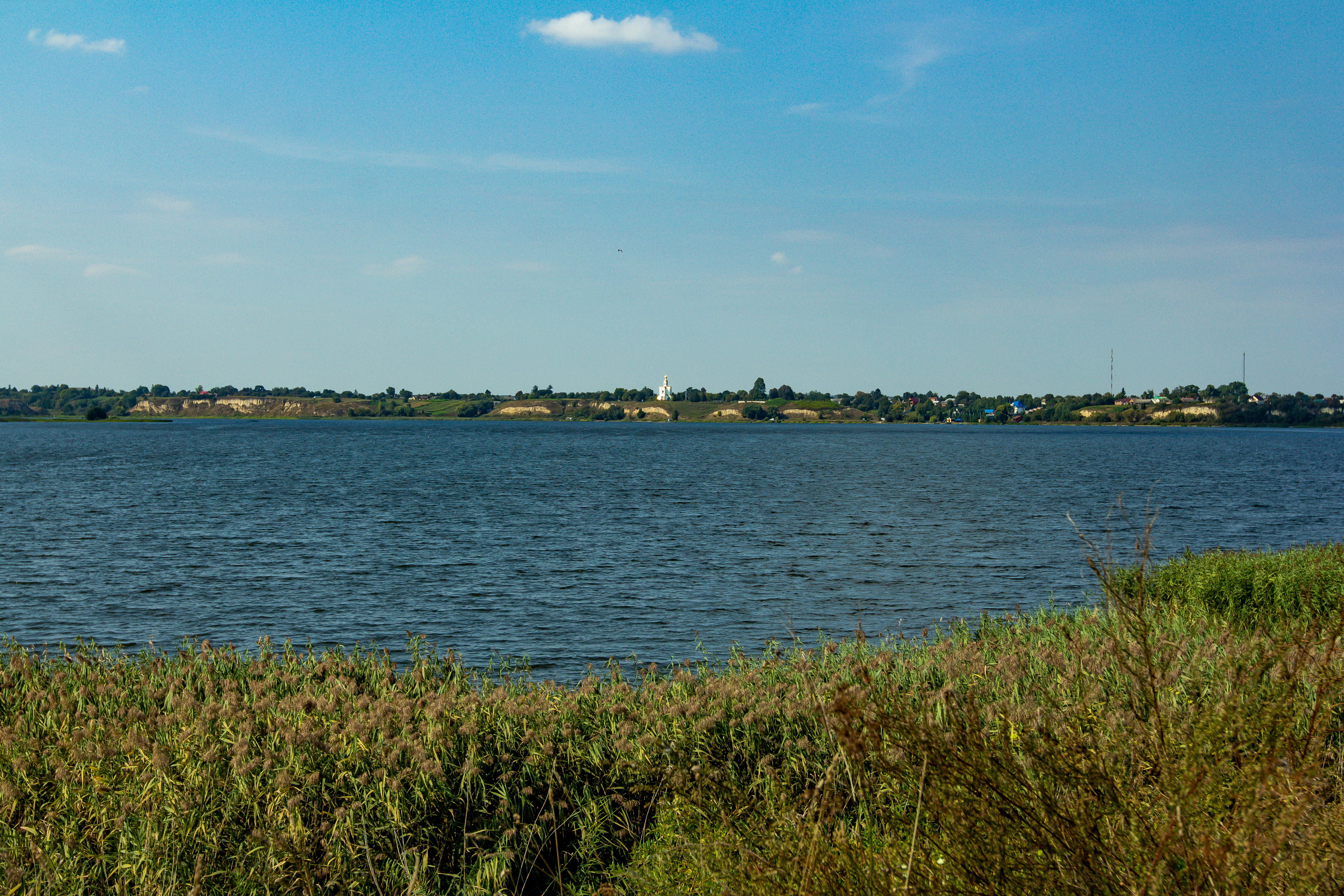 Панорама на плесо Хрінницького водосховища. Вдалині - село Набережне Демидівського району, видно церкву Святої Трійці